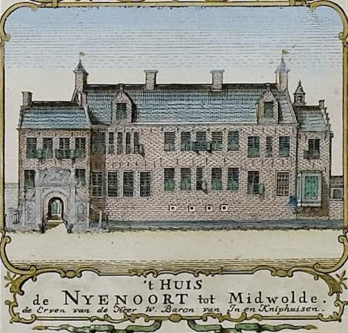 Borg Nienoord in Midwolde. Uitsnede uit de kaart van Theodorus Beckeringh uit 1781